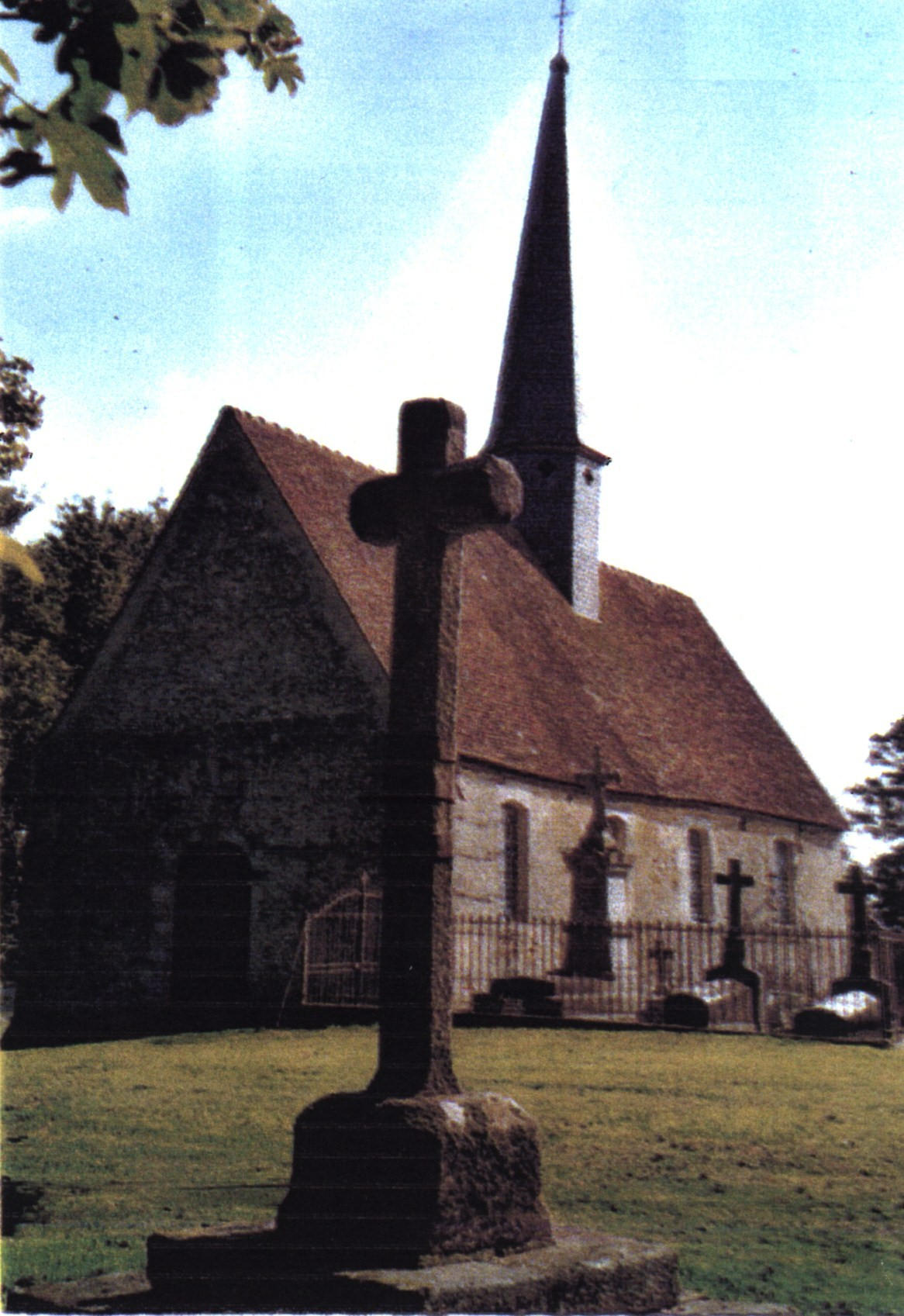 Église Saint-Paterne de Montrond, (Inscrit, 1979) .